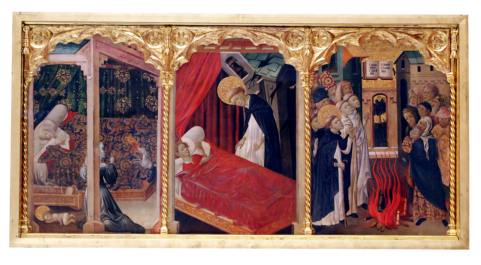 La obra representa tres escenas de la vida de Santo Domingo de Guzmán, el fundador de la Orden de los dominicos.